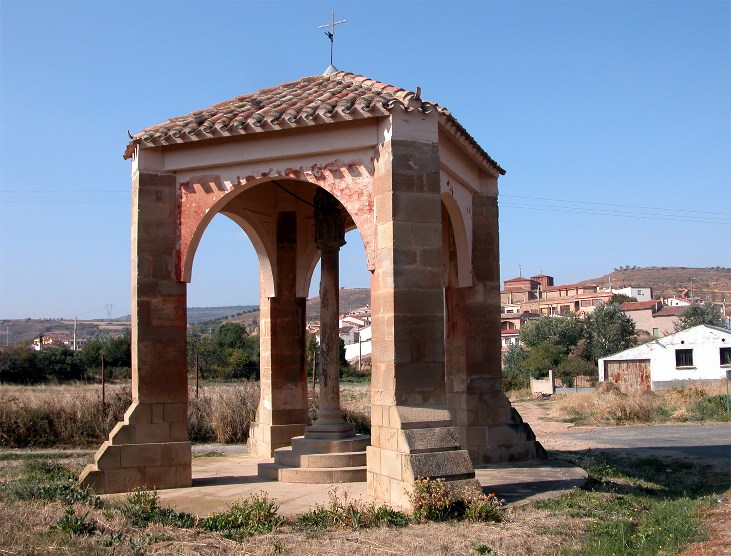 Crucero de Corera, localidad de La Rioja (España).